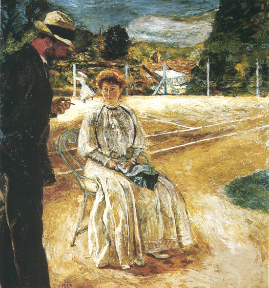 Tableau représentant le court de tennis du Château de Guernon-Ranville, peint par Vuillard en 1907